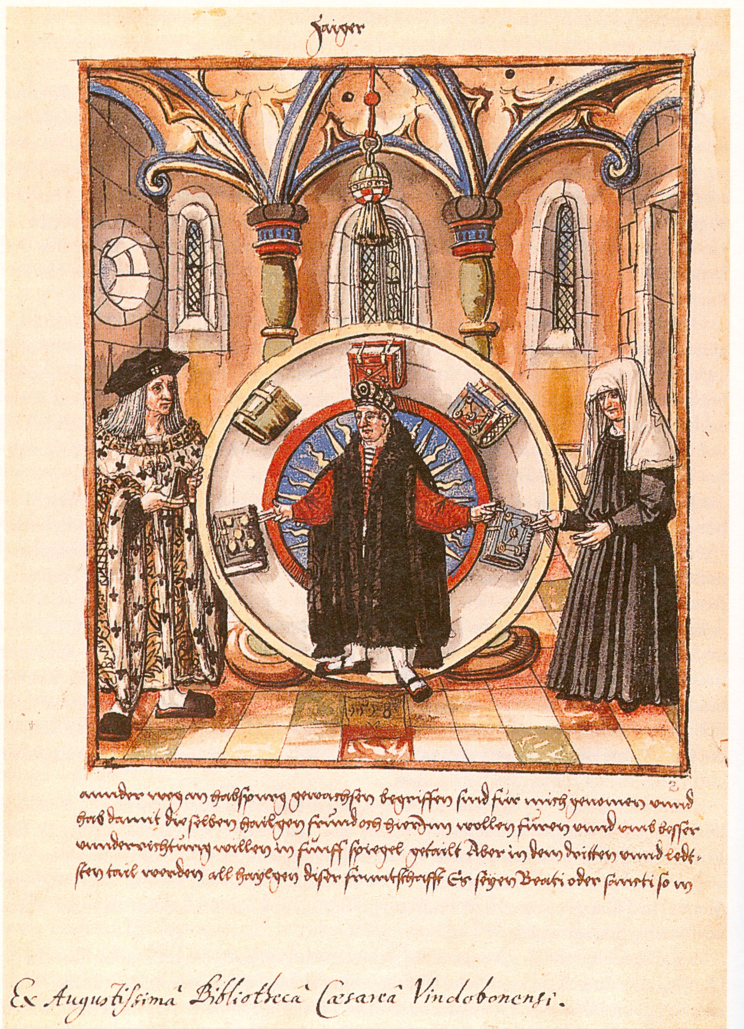 Dedikationsbild aus dem Zaiger des Jakob Mennel